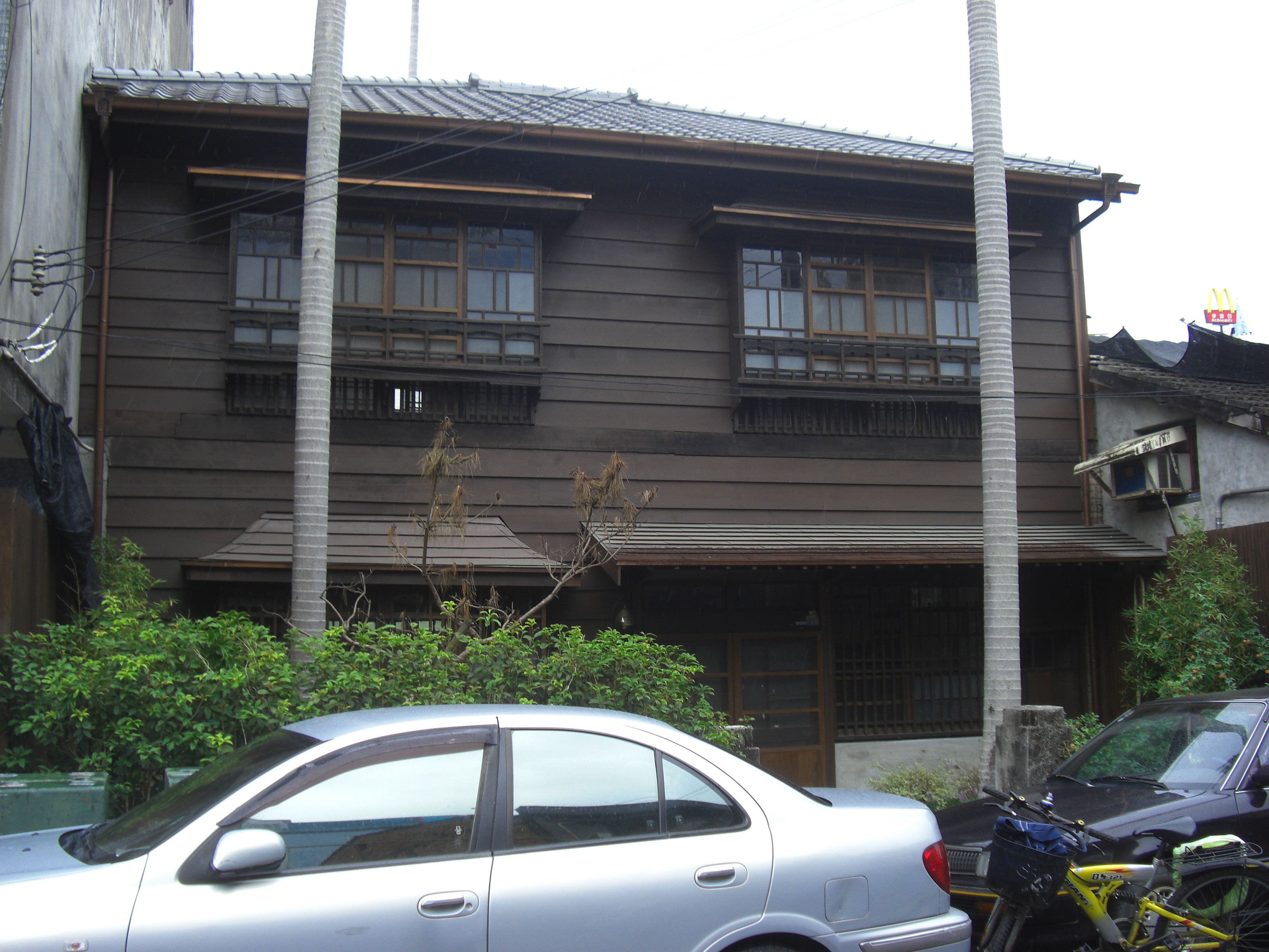 台灣宜蘭縣縣定古蹟（三級古蹟）- 舊宜蘭菸酒賣捌所